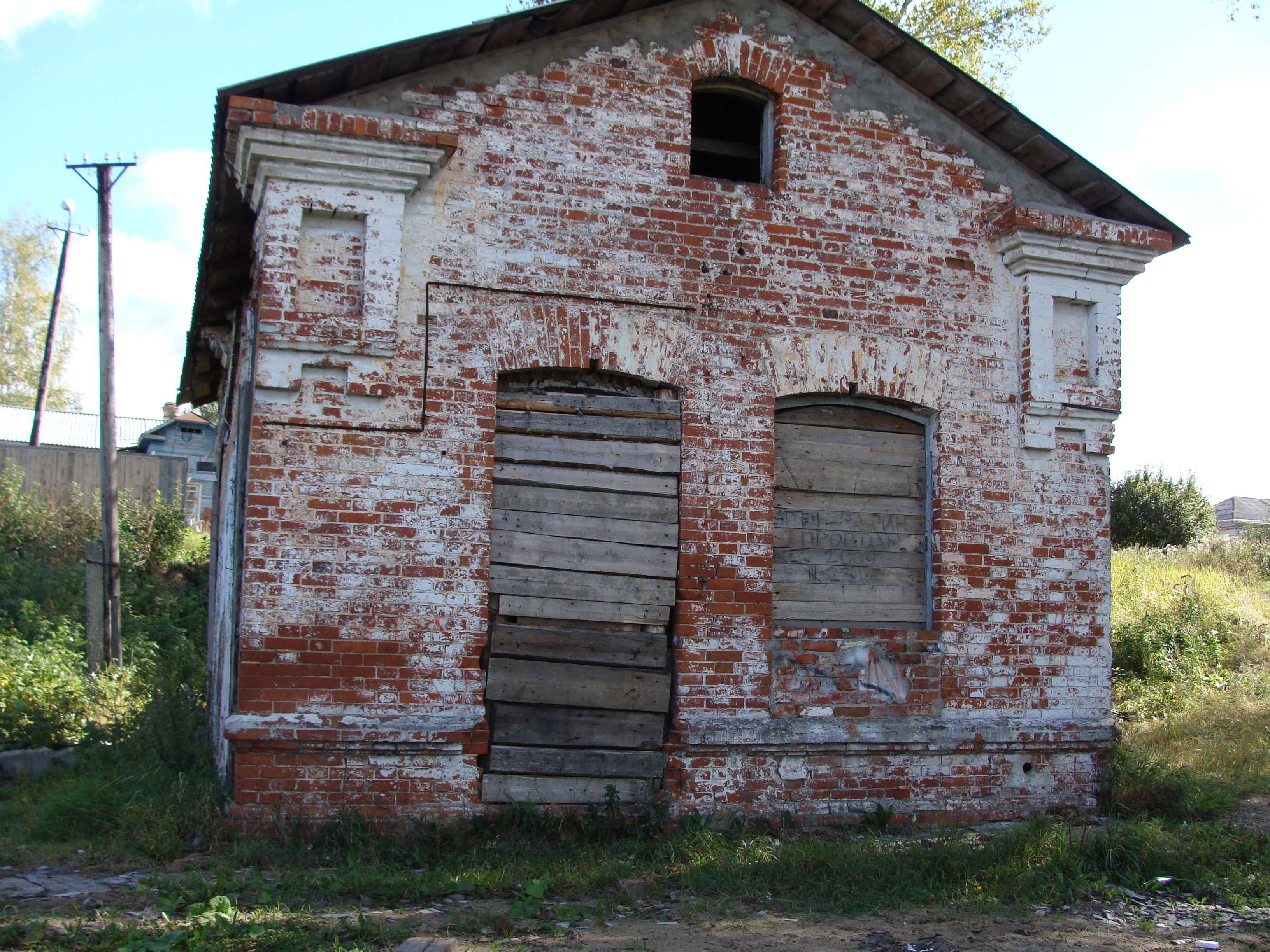 Водоподъемное здание. Котлас